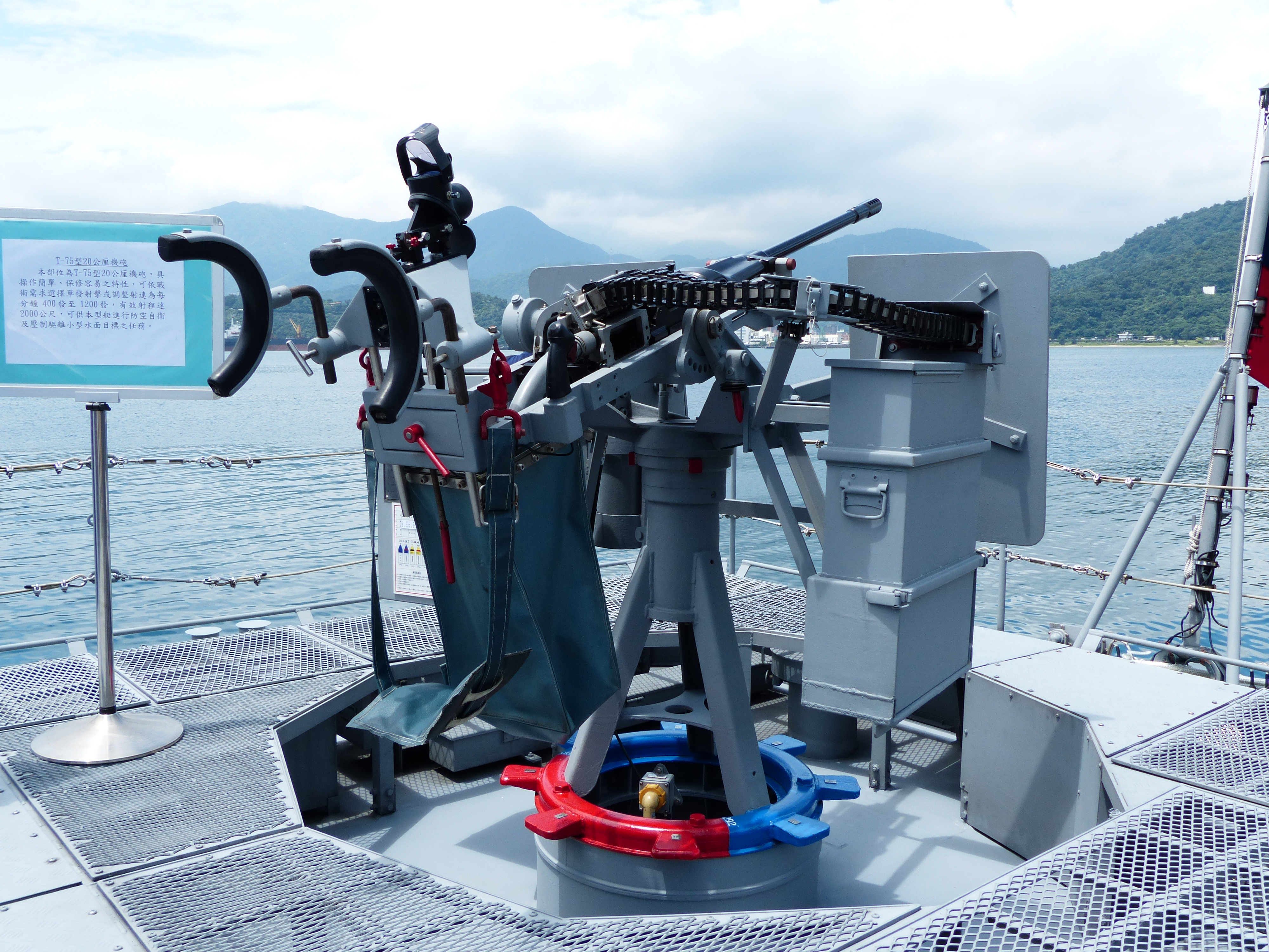 光華六號飛彈快艇FACG-77後部搭載的T-75S 20mm機關砲右斜後方，攝於2013年中正軍港營區開放活動。